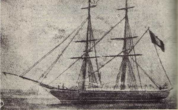 Es una antigua fotografía tomada al bergantin guise de Perú